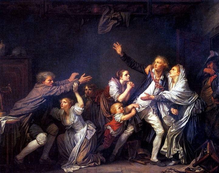 La malédiction paternelle